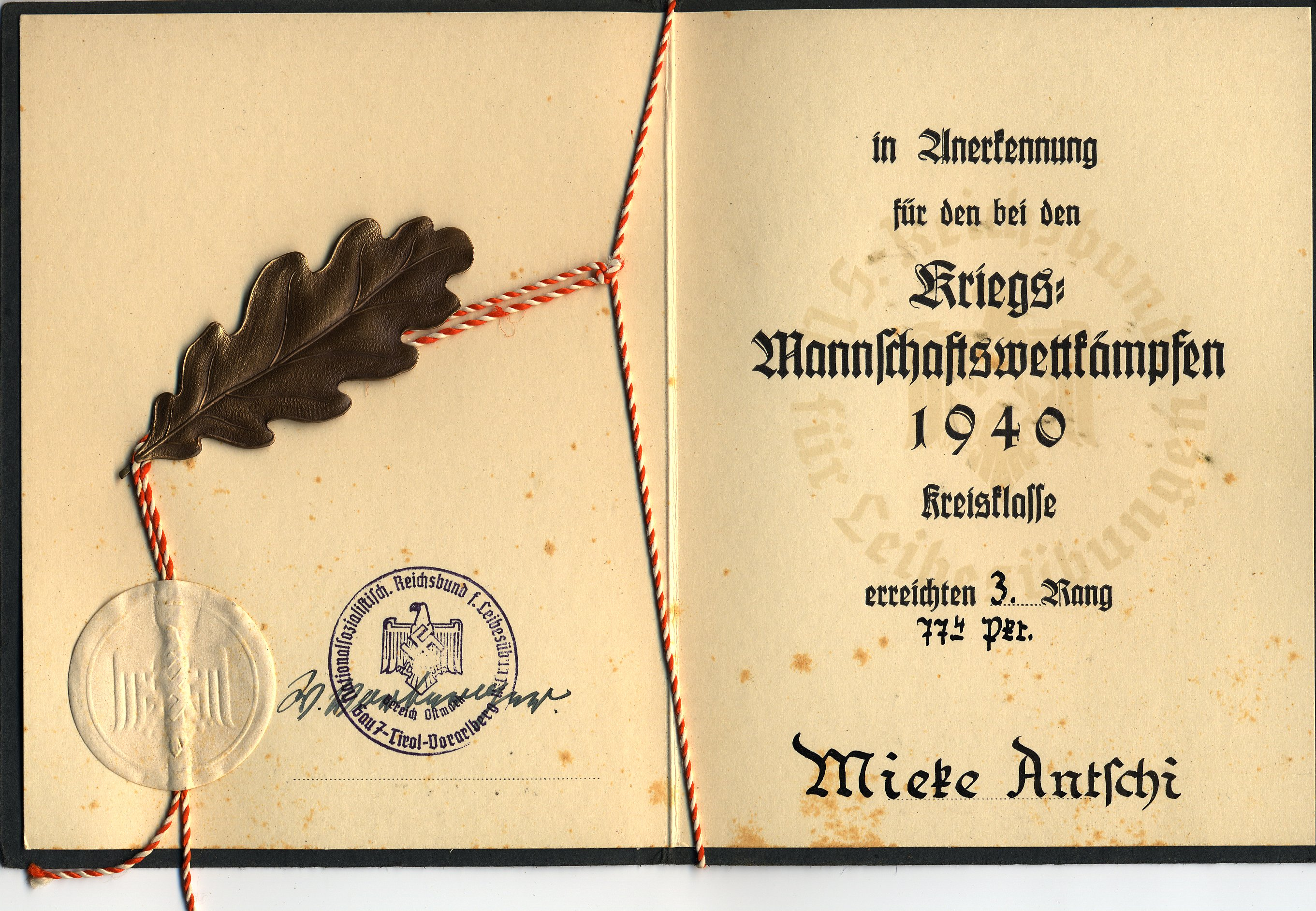 Nationalsozialistischer Reichsbund für Leibesübungen: Anerkennung für Wettkampfteilnahme der Anna ("Antschi") Mieke Das ©NSRBL-Emblem wird an vier Stellen gezeigt: außen geprägt, rechts als Wasserzeichen, links in der Stampiglie und auf dem Siegel-Kleber. Kriegs=Mannschaftswettkämpfe 1940, Kreisklasse